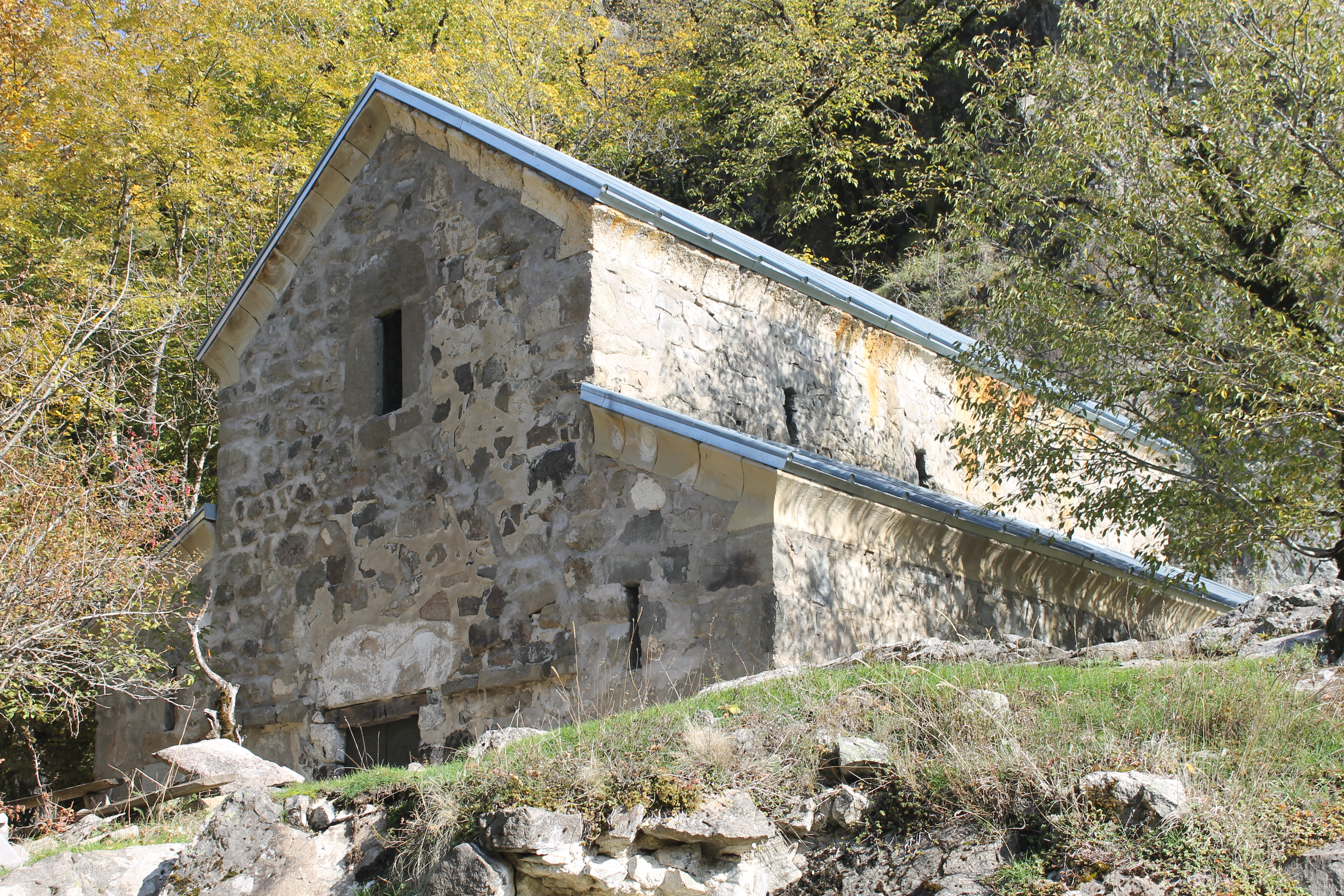 ქვაბისხევის ეკლესია